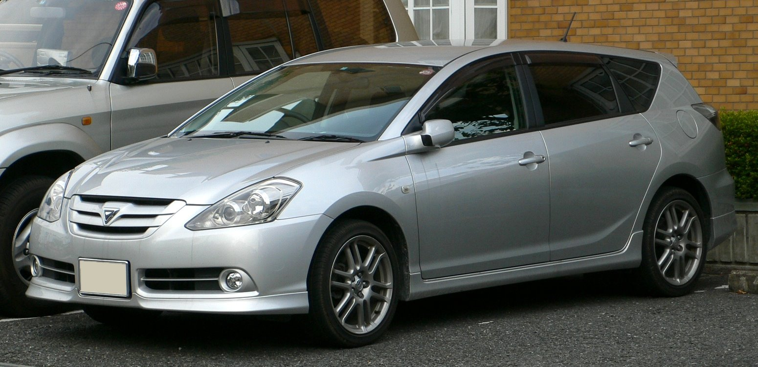 3rd Toyota Caldina (2005 - 2007)